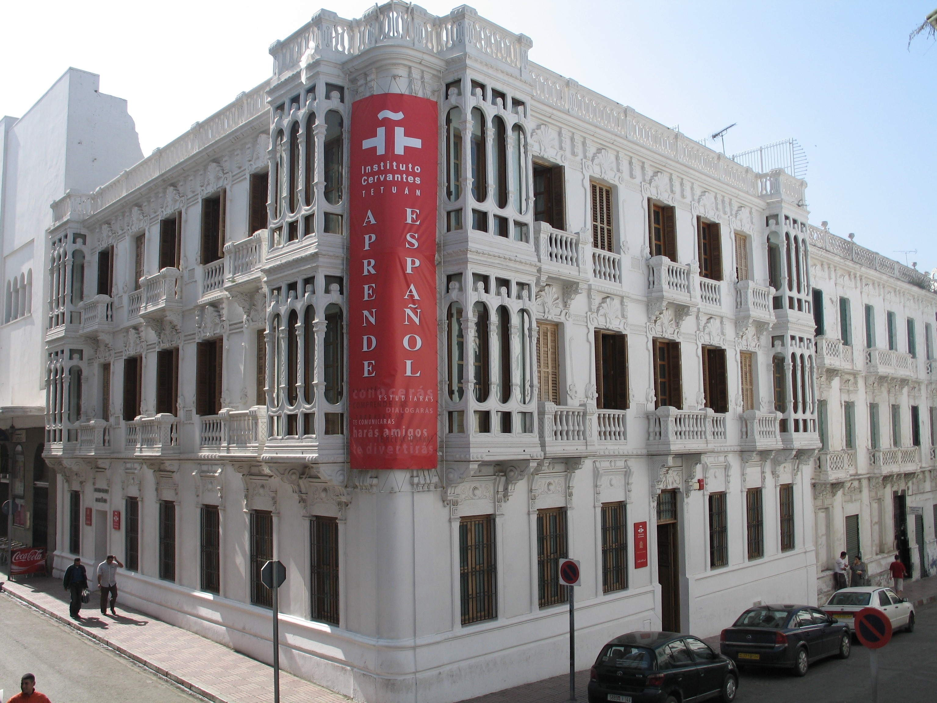 Plano general de la fachada del edificio del Instituto Cervantes de Tetuán